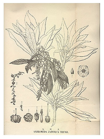 Andromeda japonica Thunb./Pieris japonica subsp. japonica